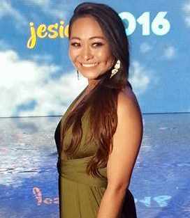 Polska aktorka Misheel Jargalsaikhan w sierpniu 2016 roku.